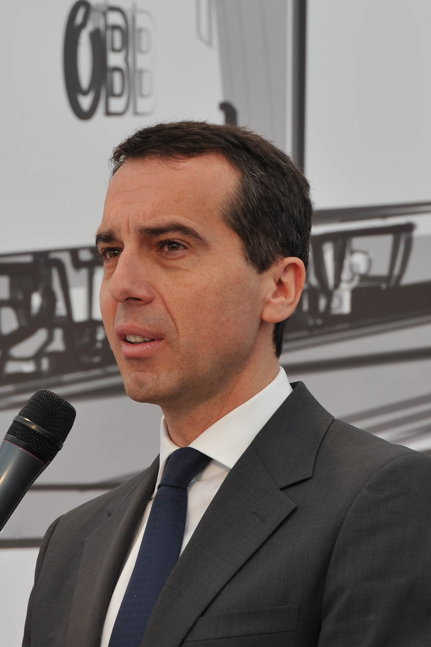 Spatenstich des Semmering-Basistunnels am 25. April 2012: Christian Kern